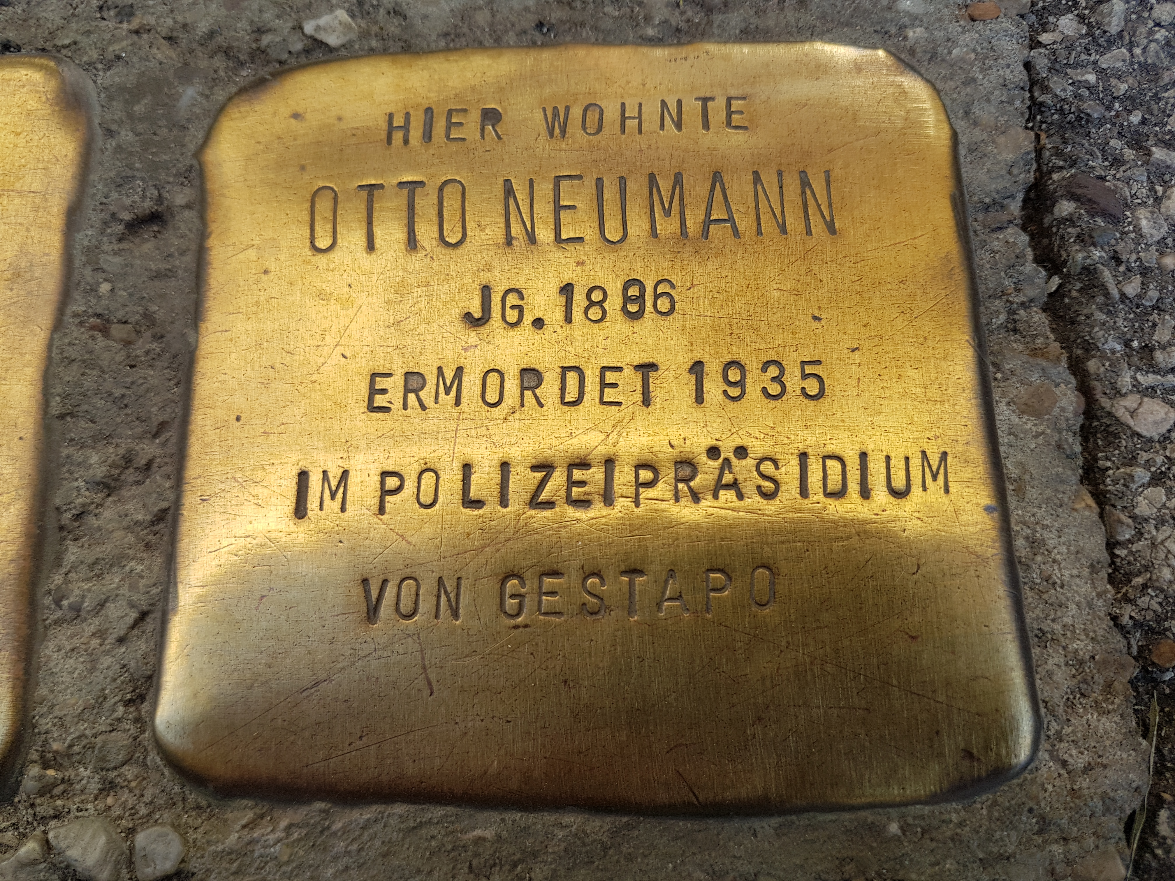 Stolperstein Duisburg Otto Neumann